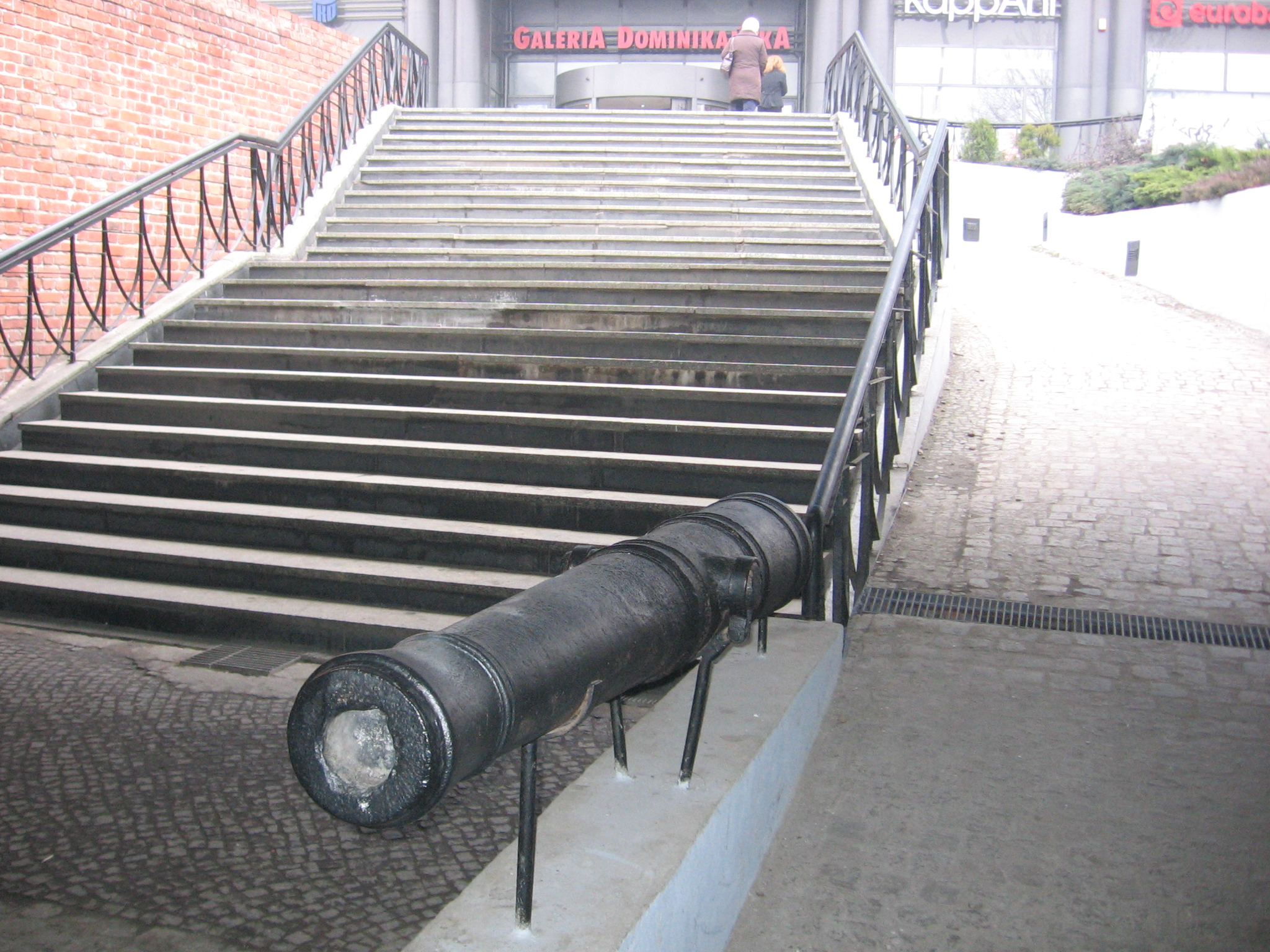 wyjście z przejścia podziemnego koło Bramy Oławskiej w kierunku Galerii Dominikańskiej